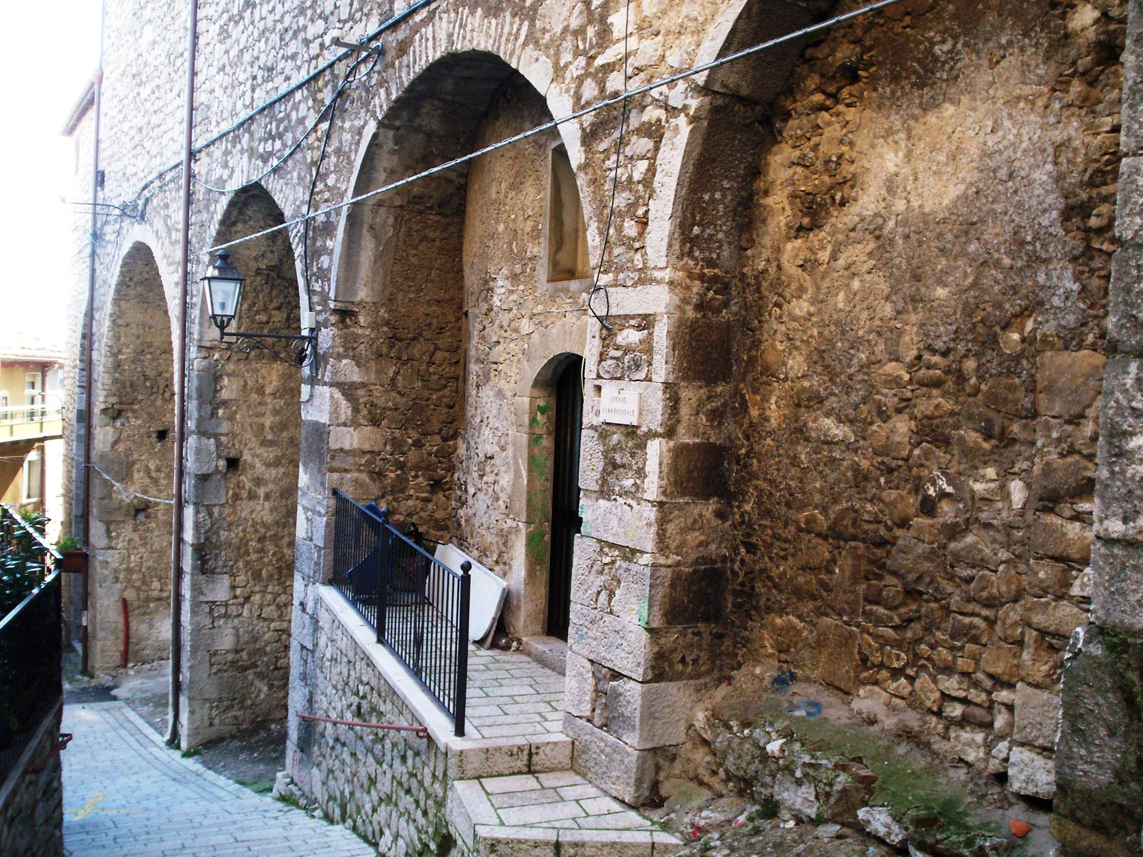 particolare delle arcate sottostanti la chiesa di san Giovanni in Cusano Mutri (Bn)